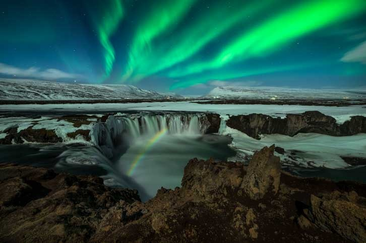 קשת ירחית ב-Godafoss, איסלנד